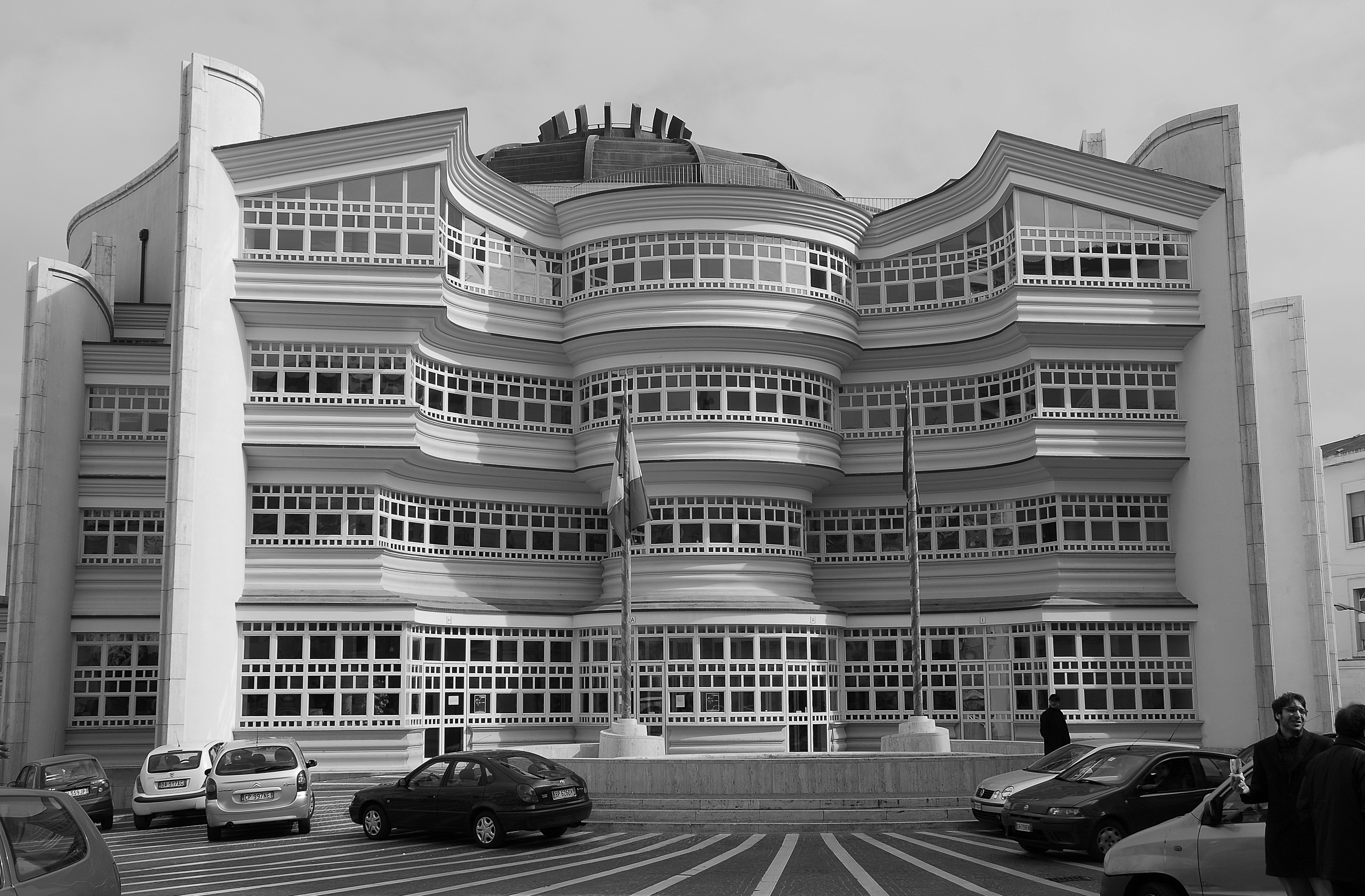 Catanzaro, ITA - Il teatro è sito nel centro storico di Catanzaro, fu inaugurato nel 2002, e realizzato sul progetto di Paolo Portoghesi. Un tempo, nello stesso luogo era presente l’omonimo cinema e teatro realizzato negli anni Trenta e un mercato coperto dello stesso periodo. Il teatro è caratterizzato da uno dei palcoscenici più avanzati in Italia da un aspetto tecnologico. La sala centrale presenta una forma a ferro di cavallo attorno alla quale si sviluppa l’edificio stesso riproponendo la tradizione del teatro classico italiano.